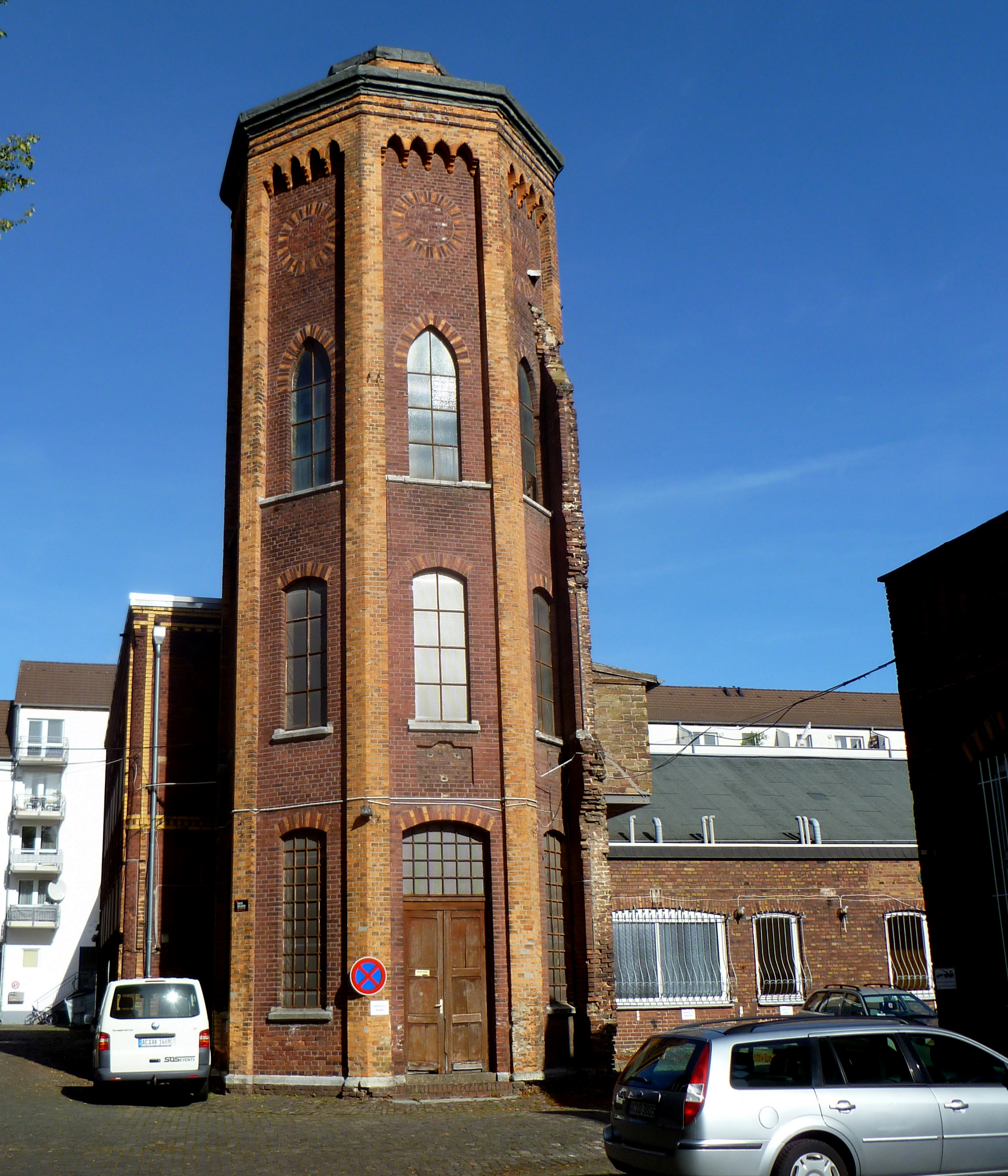 ehem. Tuchfabrik Aachen in der Charlottenstraße in Aachen, Treppenturm, Architekt Otto Intze, Baudenkmal